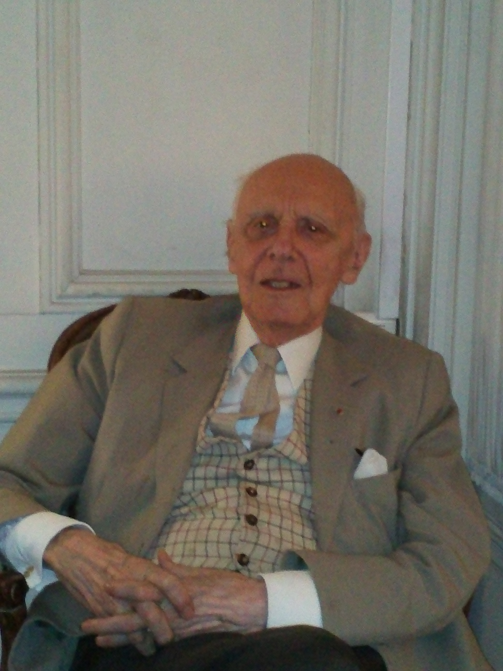 Compositeur français né en 1913